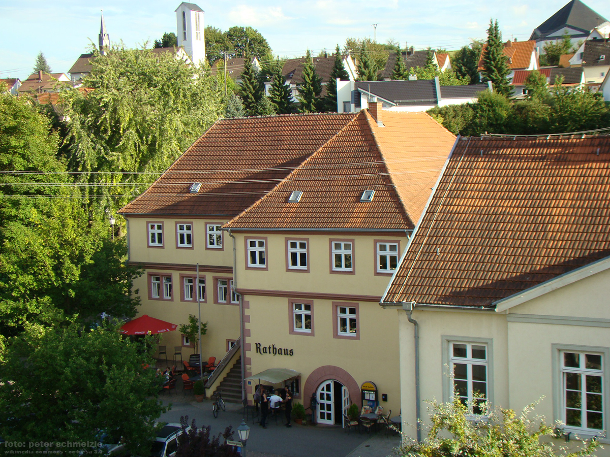 Rathaus (ehem. Alexanderschloss) in Neckarbischofsheim